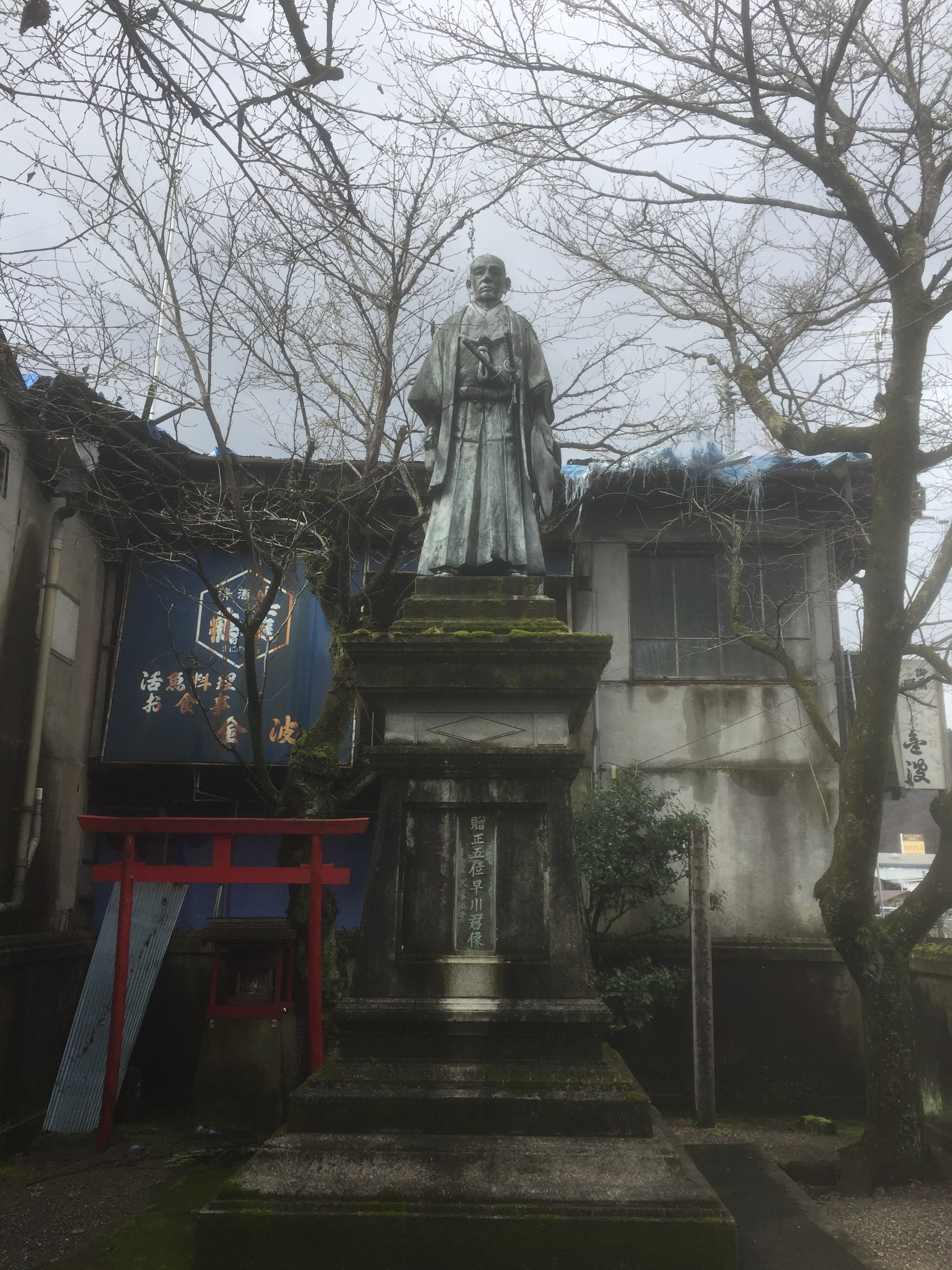 重願寺の一角にある早川正紀の銅像